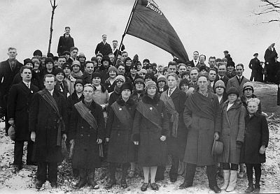 Vappuairueet. Helsingin Nuorten Työläisten Opintoyhdistys vappuna lippunsa kanssa Hakasalmen puistossa. Nykyinen Hesperian puisto.